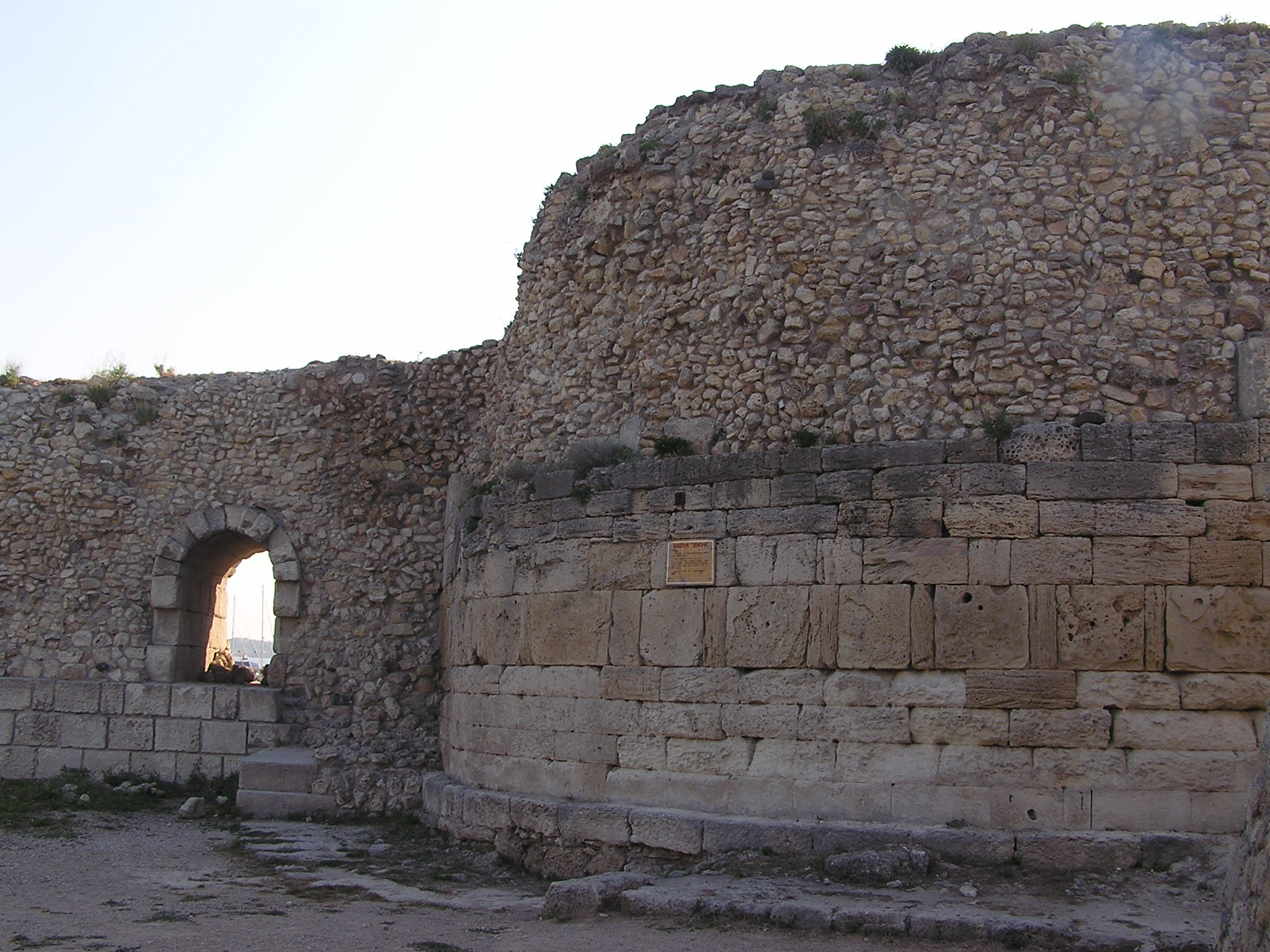 Херсонес. Башня Зенона